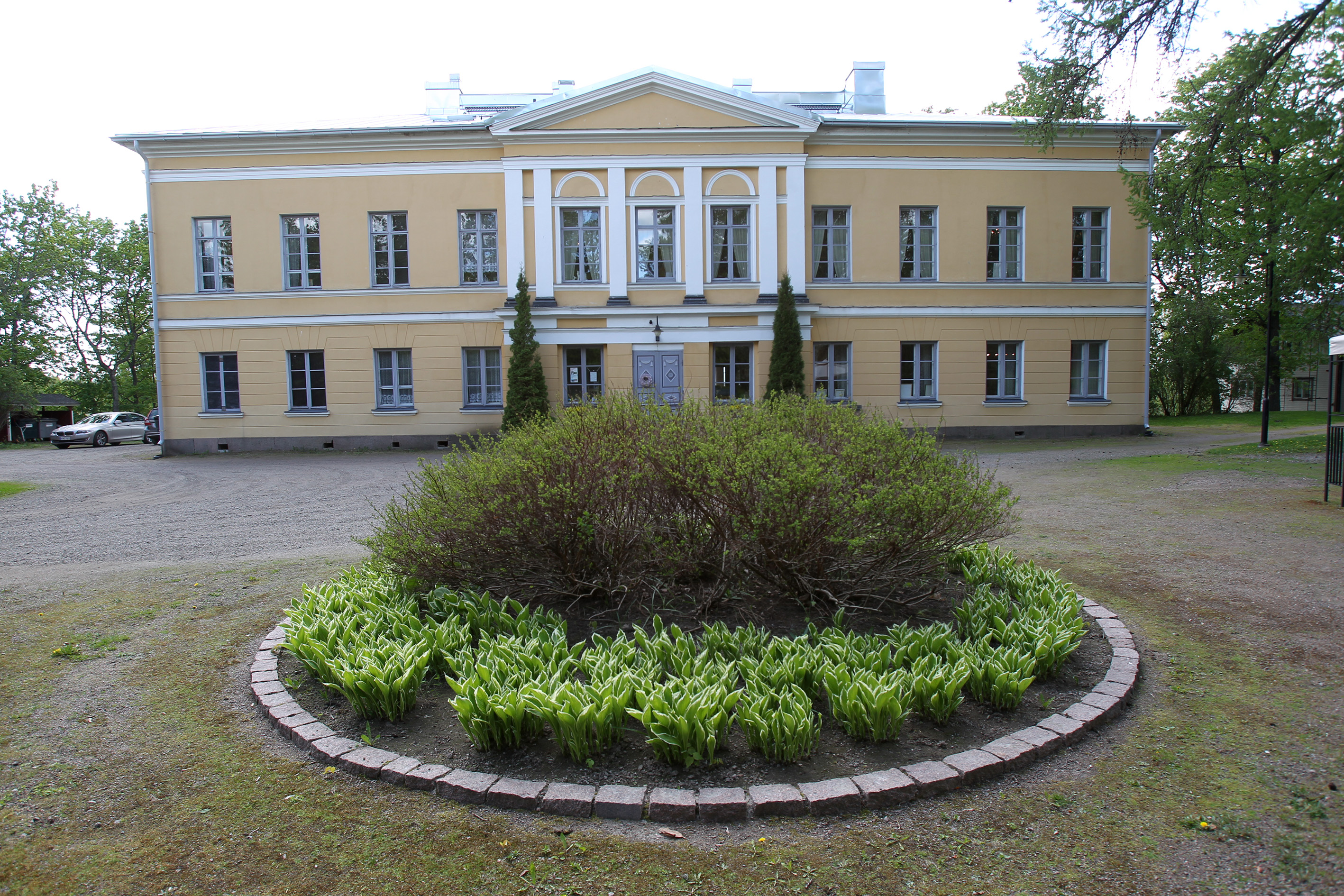 moision kartano